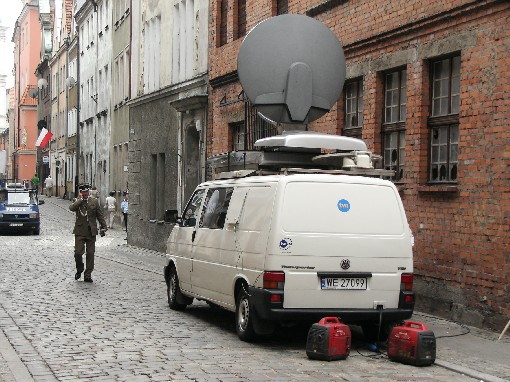 Wóz reporterski TVN w Poznaniu (Volkswagen T4).